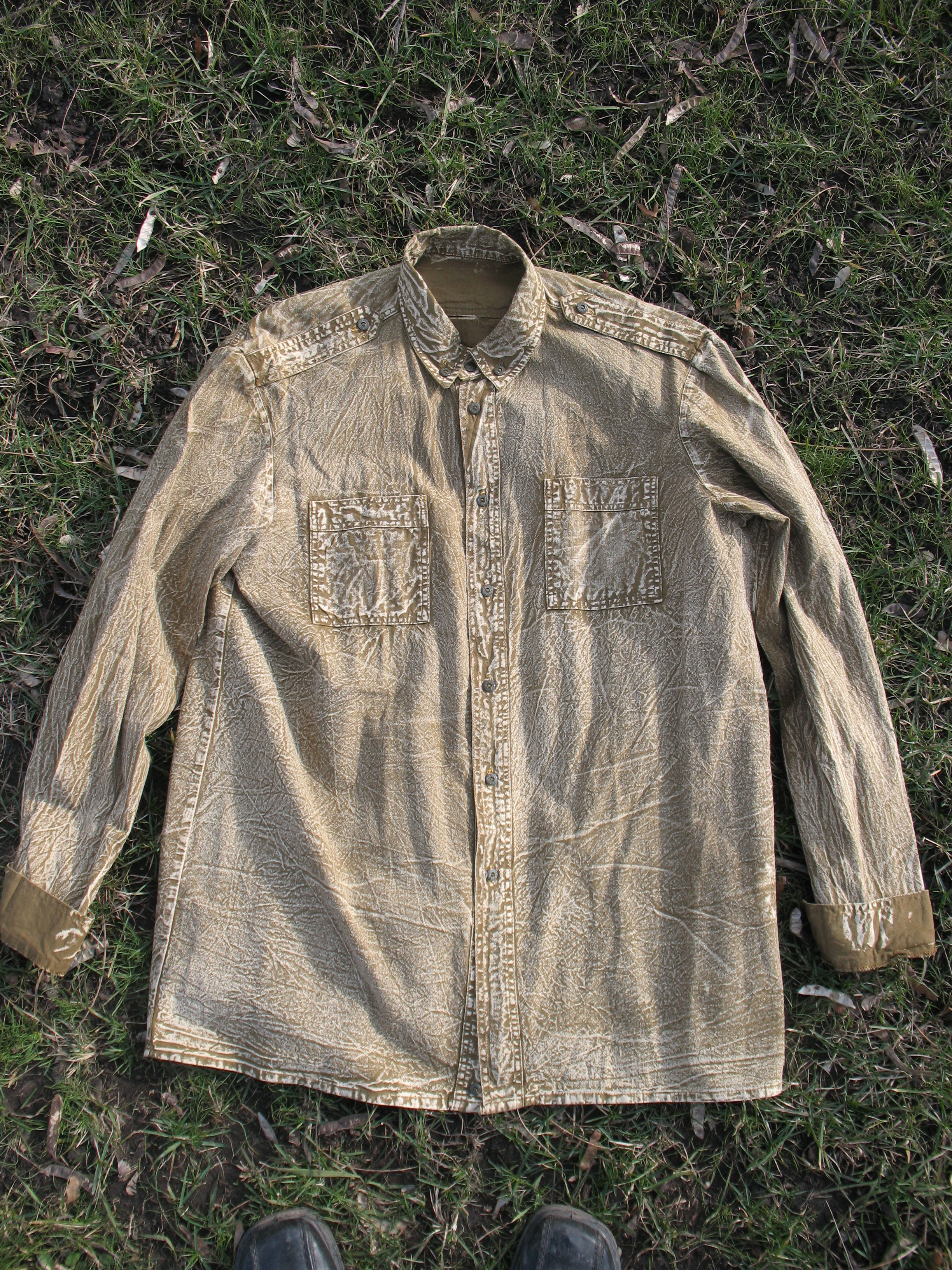 Рубашка варёная мужская из джинсовой ткани. СССР, Вилкавишкис Литовской ССР, государственная швейная фабрика. Рост 188 см ("типичный прибалтийский"), размер 96 (48-й).